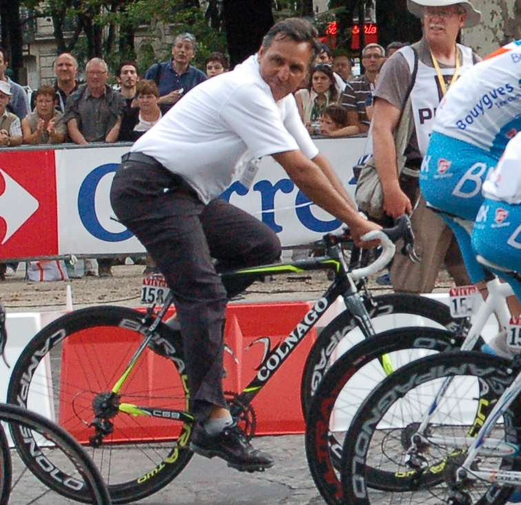 Jean-René Bernaudeau lors de la dernière étape du Tour de France 2010